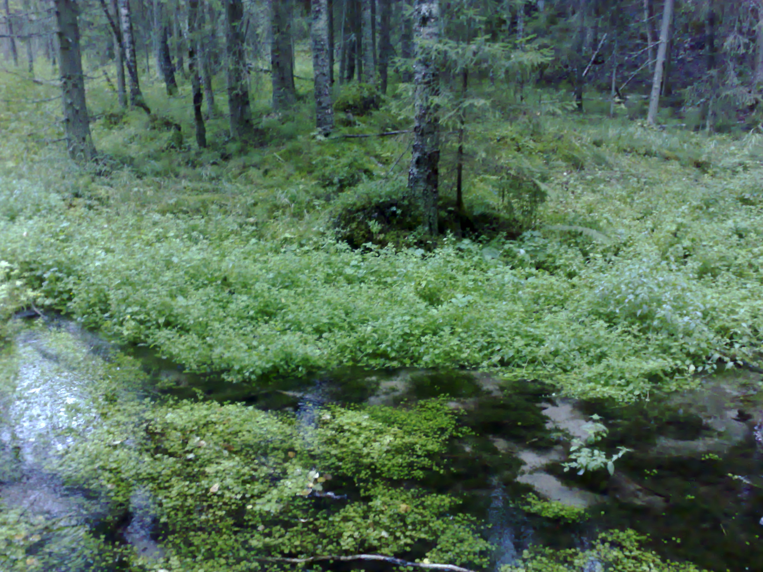 Kuva ryövärinpolun luonnonsuojelualueelta.